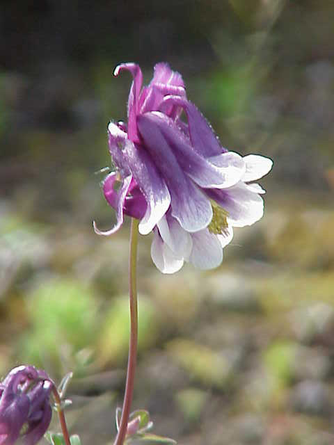 Name Aquilegia vulgaris cultivar Family Ranunculaceae Image no. 1